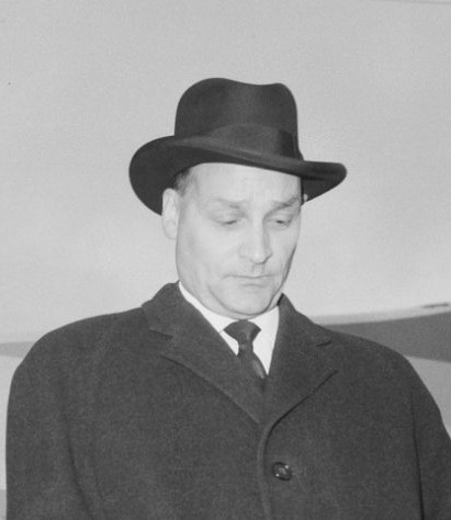 Aankomst van (...) de Noorse minister van Verkeer Erik Himle op Schiphol